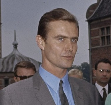 Koninklijke verloving in Kopenhagen. Hendrik, prins van Denemarken